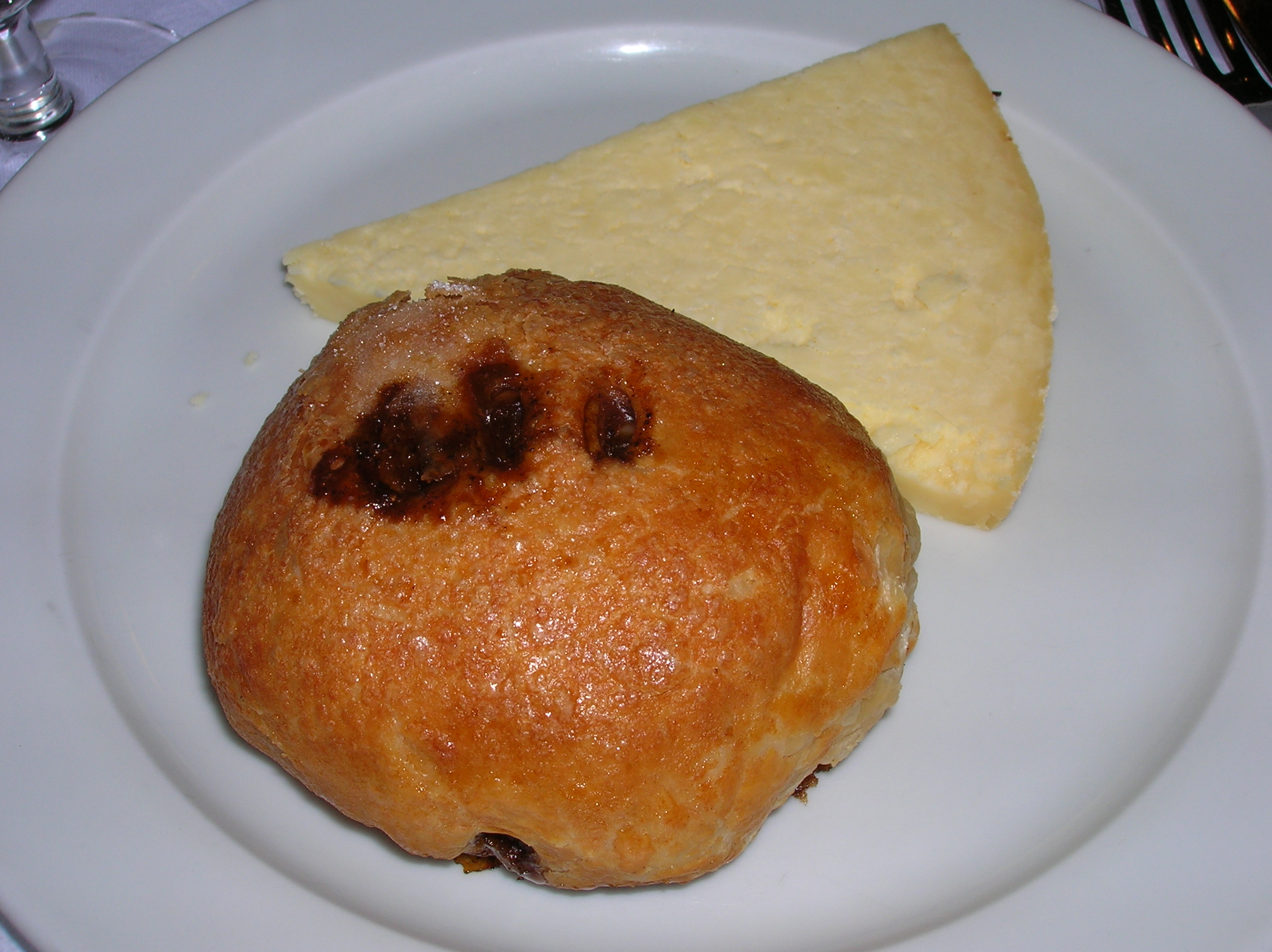 עוגת אקלס עם גבינת לנקשיר, במסעדת סנט ג'והן, לונדון